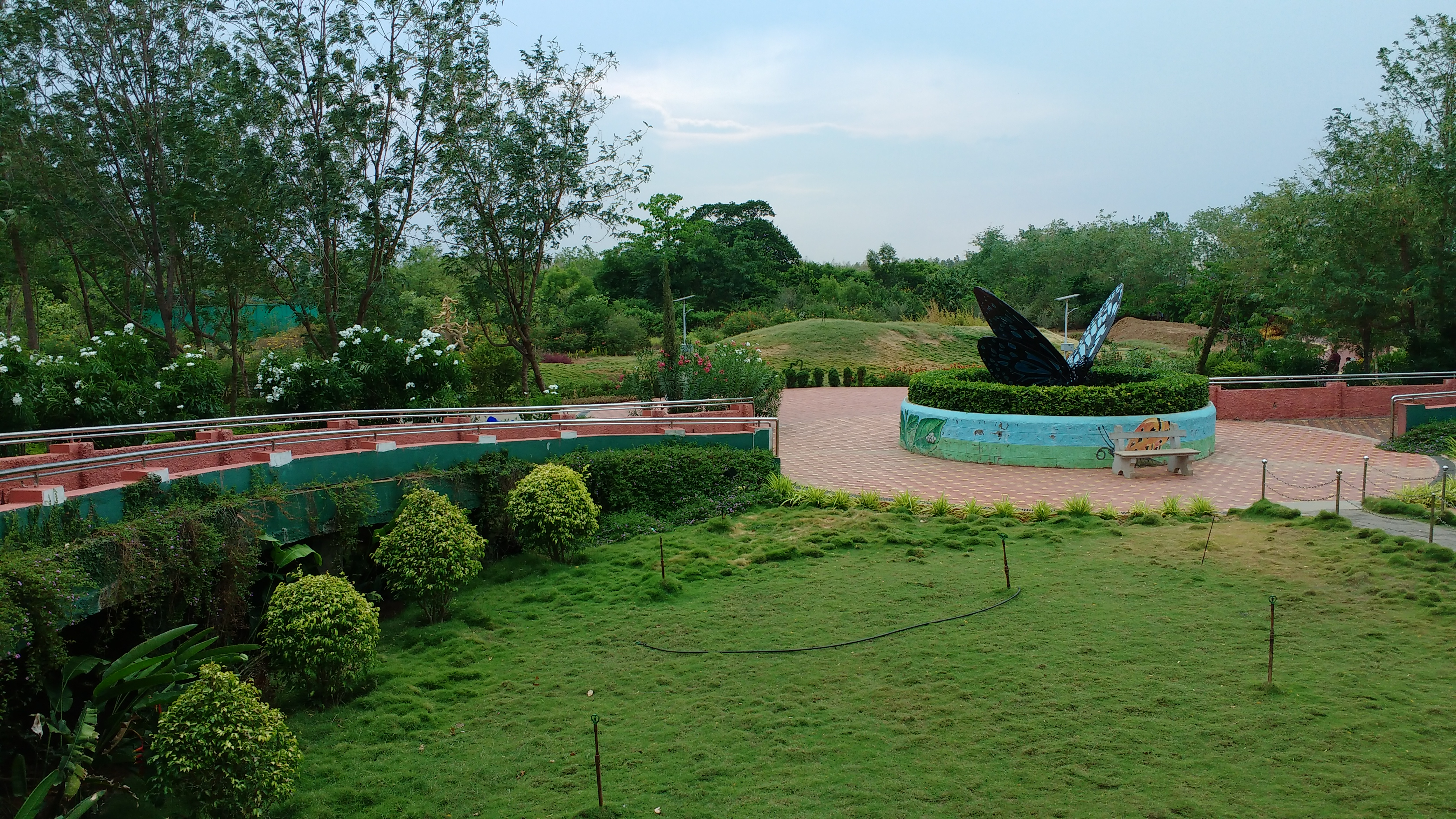 ஸ்ரீரங்கம் வண்ணத்துப்பூச்சி பூங்காவின் நுழைவுப்பகுதி